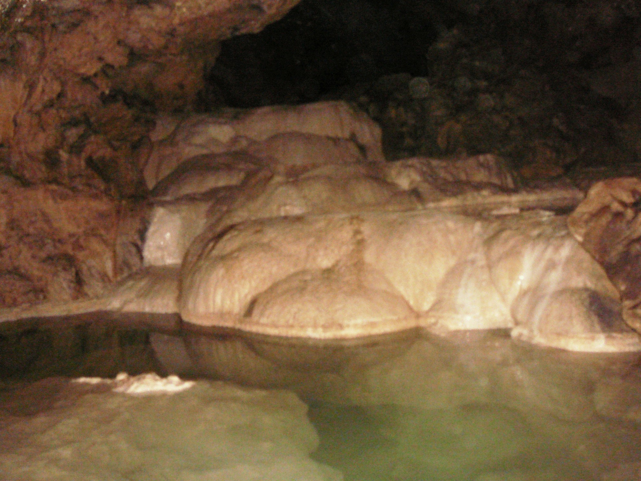 ingresso grotta calgeron